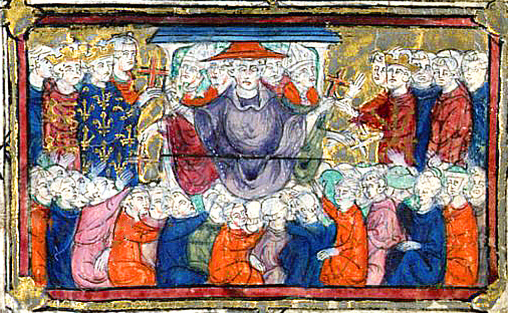 Cardinal Nicolas de Fréauvillle prêchant la croisade devant trois rois